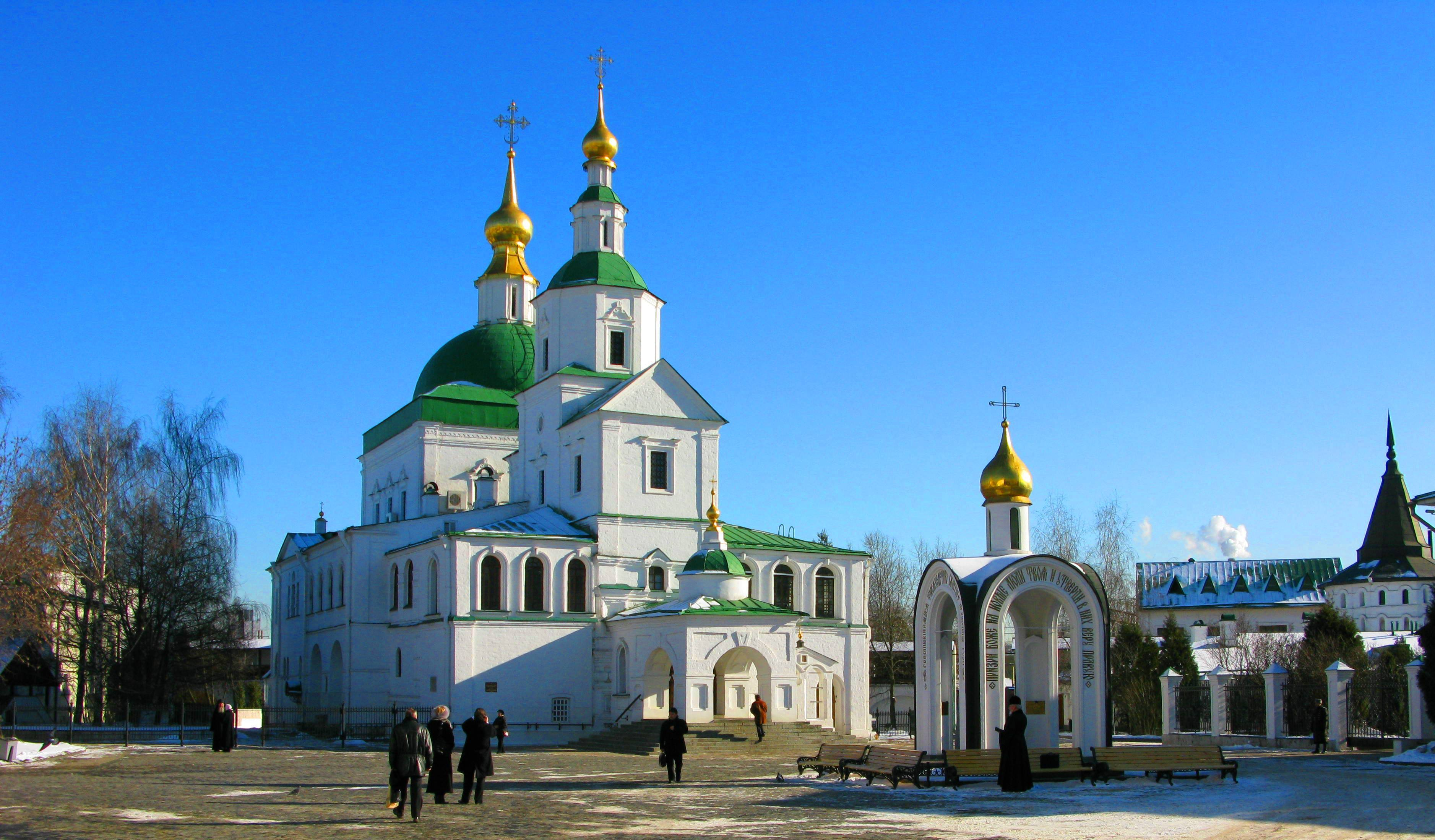 Данилов монастирь. Moscow, Russia.